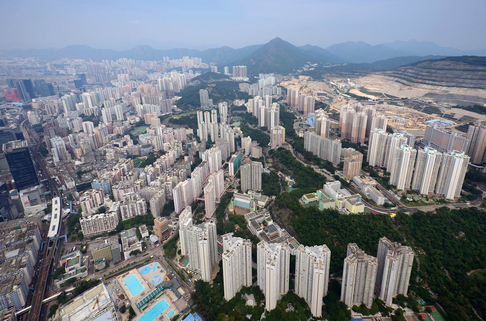 九龍東,觀塘